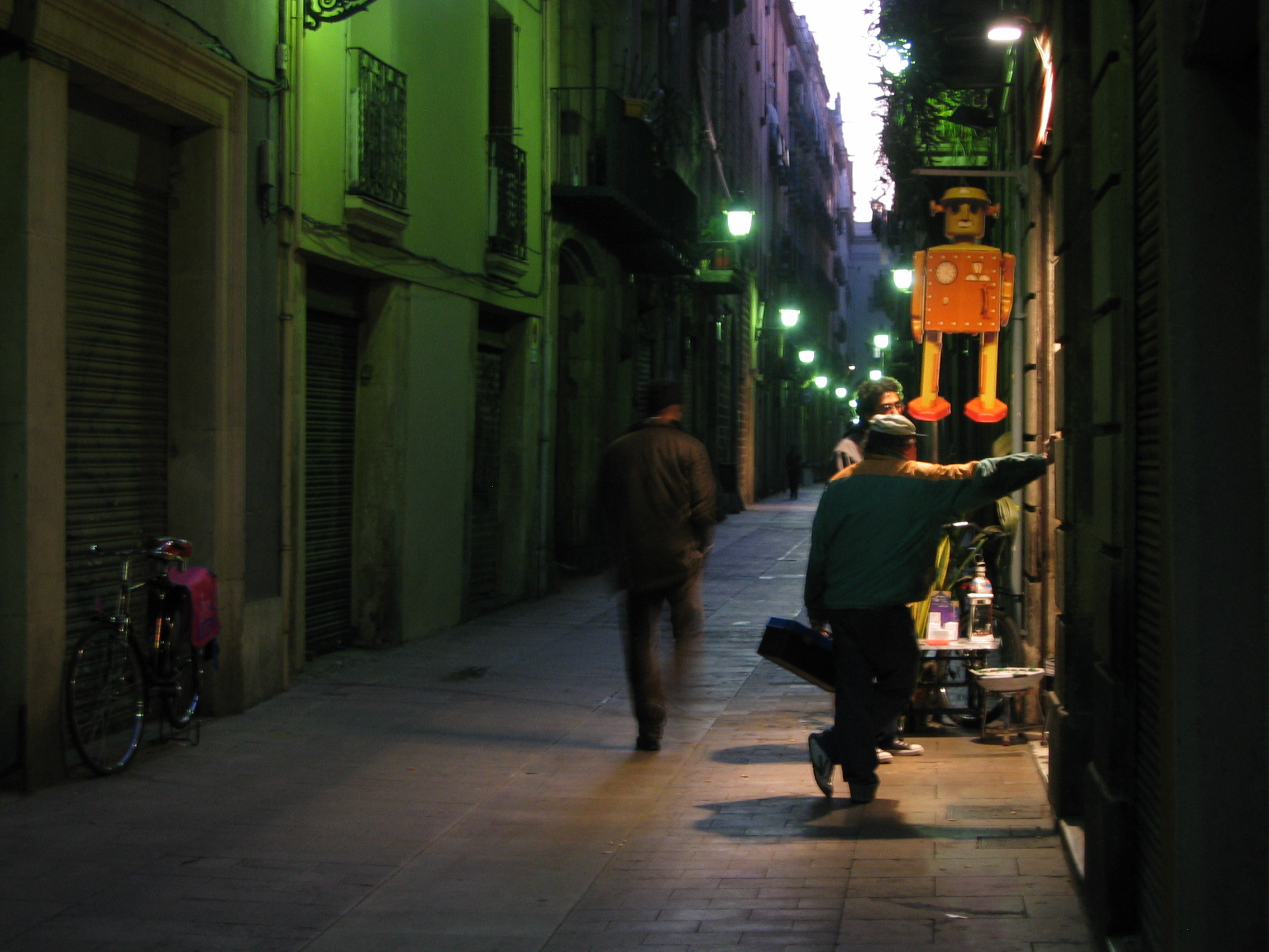 Nagtelike straattoneel in die Barri Gòtic.